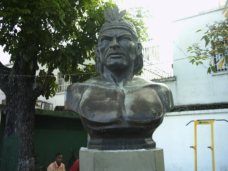 Busto del Indio Baruta, en Caracas I´m the author of this photo, i take it in 2006. Guillermo Ramos Flamerich